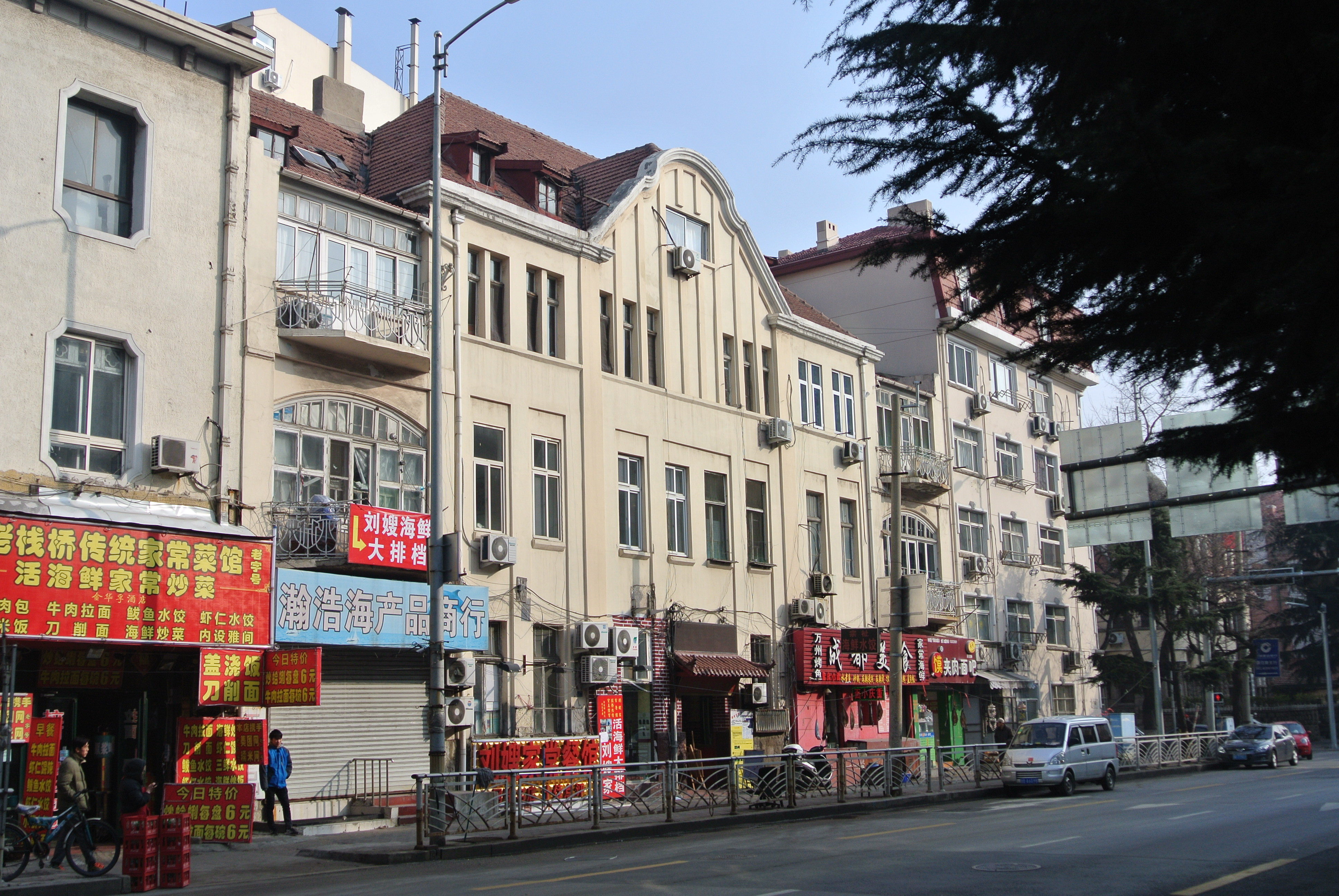 青岛广西路43号